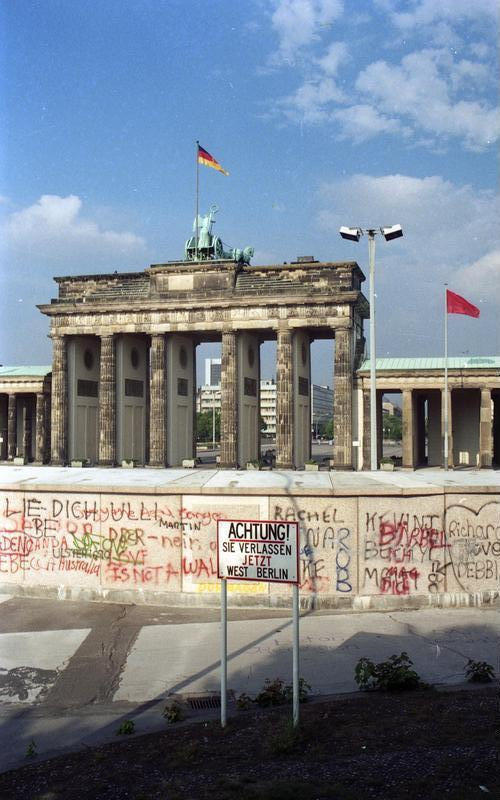 Juni 1988 Berlin, Brandenburger Tor, Mauer